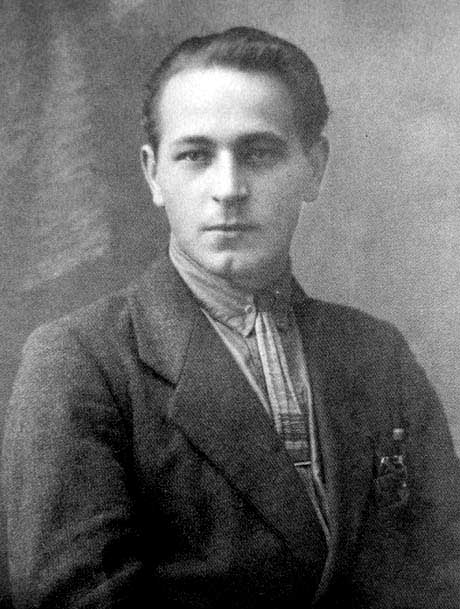 Олійник Анатоль Андрійович - український поет